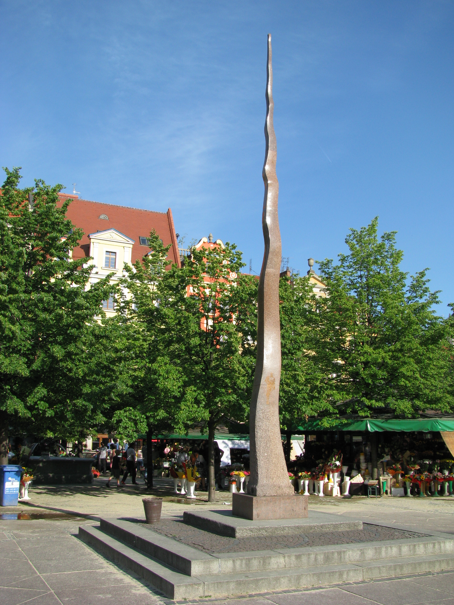 Mała iglica na Placu Solnym.